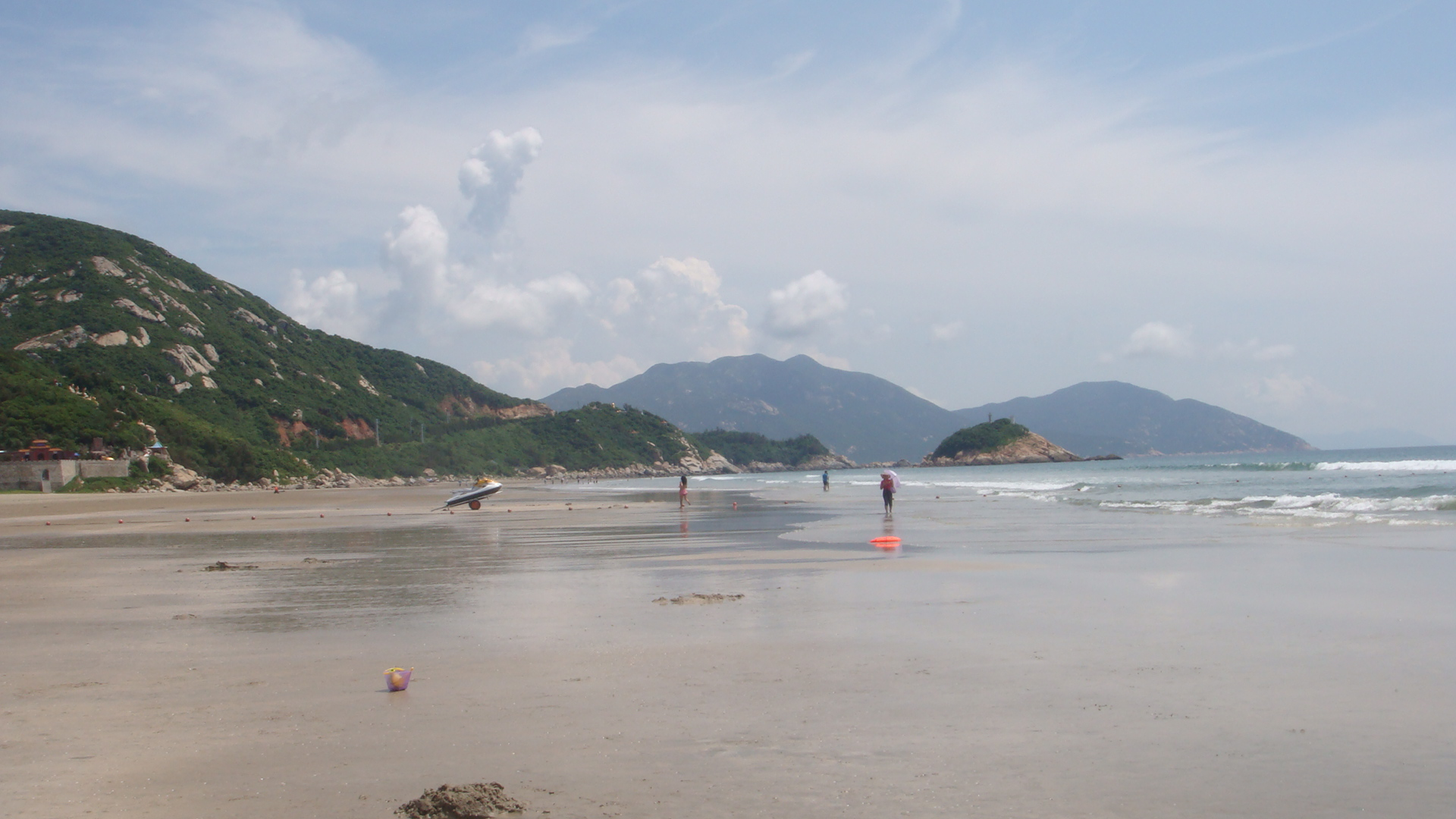 中国广东省江门市台山上川岛 China Guangdong Province, Jiangmen City, Taishan, on the Kawashima China Xinjiang Urumqi Welcome you to tour the, Китай Синьцзяна Урумчи приветствовать Вас на экскурсию, الصين ترحب زيارتك لاورومتشى فى شينجيانغ, 中国新疆のウルムチへの訪問を歓迎する, 中国新疆乌鲁木齐欢迎您来观光旅游